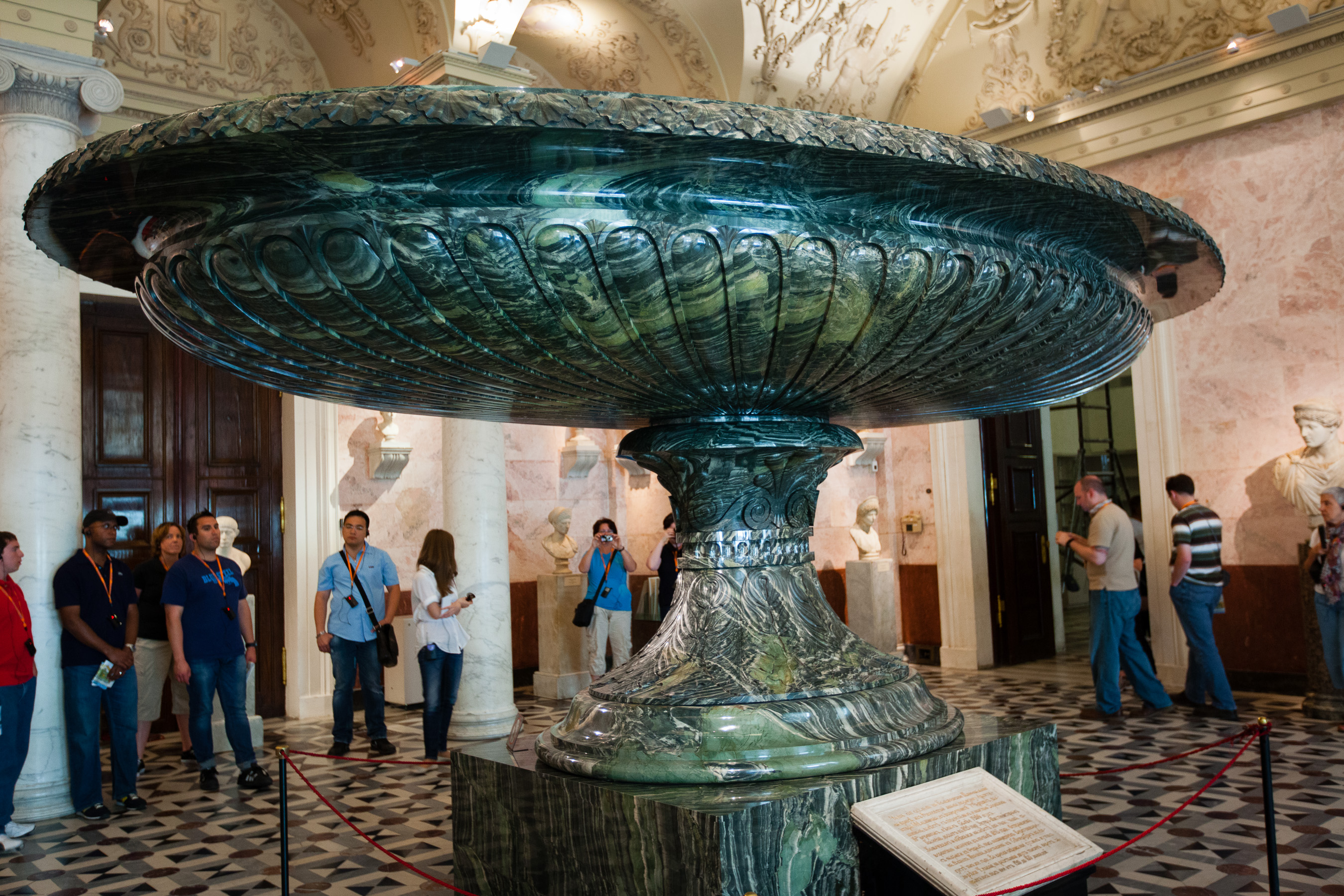 St. Petersburg